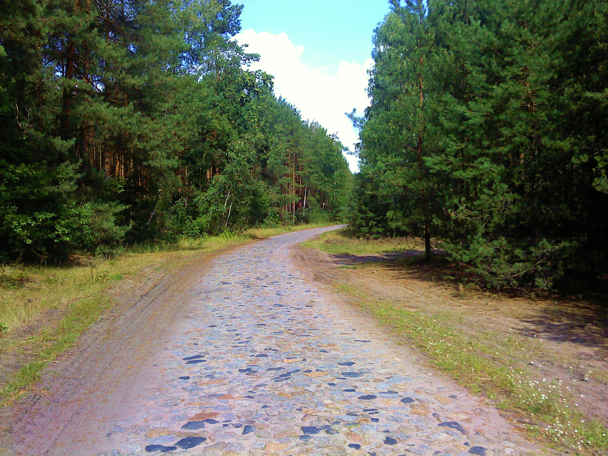 Droga brukowa została wybudowana w 1 poł. XX wieku. Nie cała jej część jest brukowa. Droga prowadzi przez lasy i pola z Piaseczna przez Warkę, Studzianki Pancerne do Jedlińska.